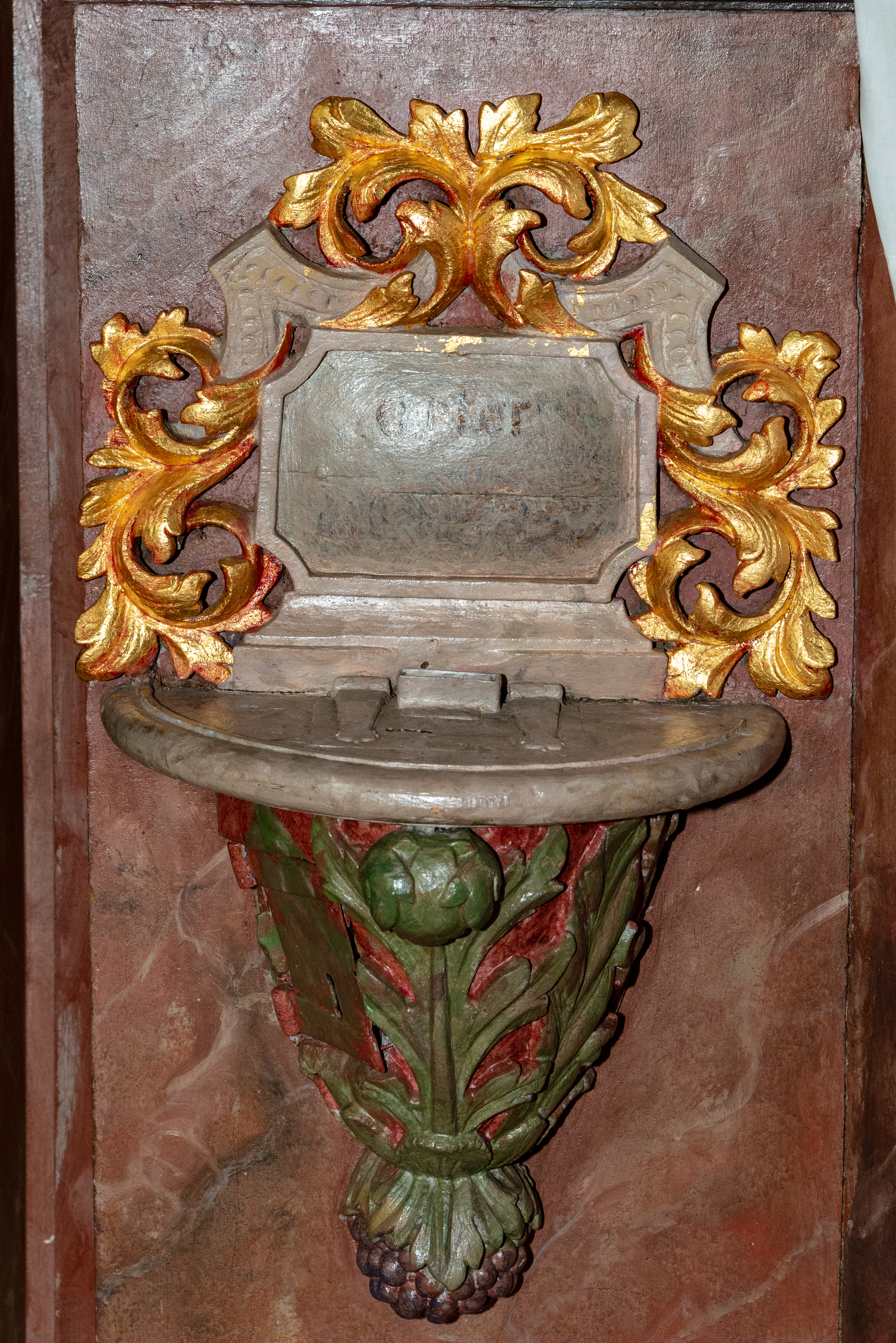 En Afferstack am Chouer vun der Kierch zu Diänjen.